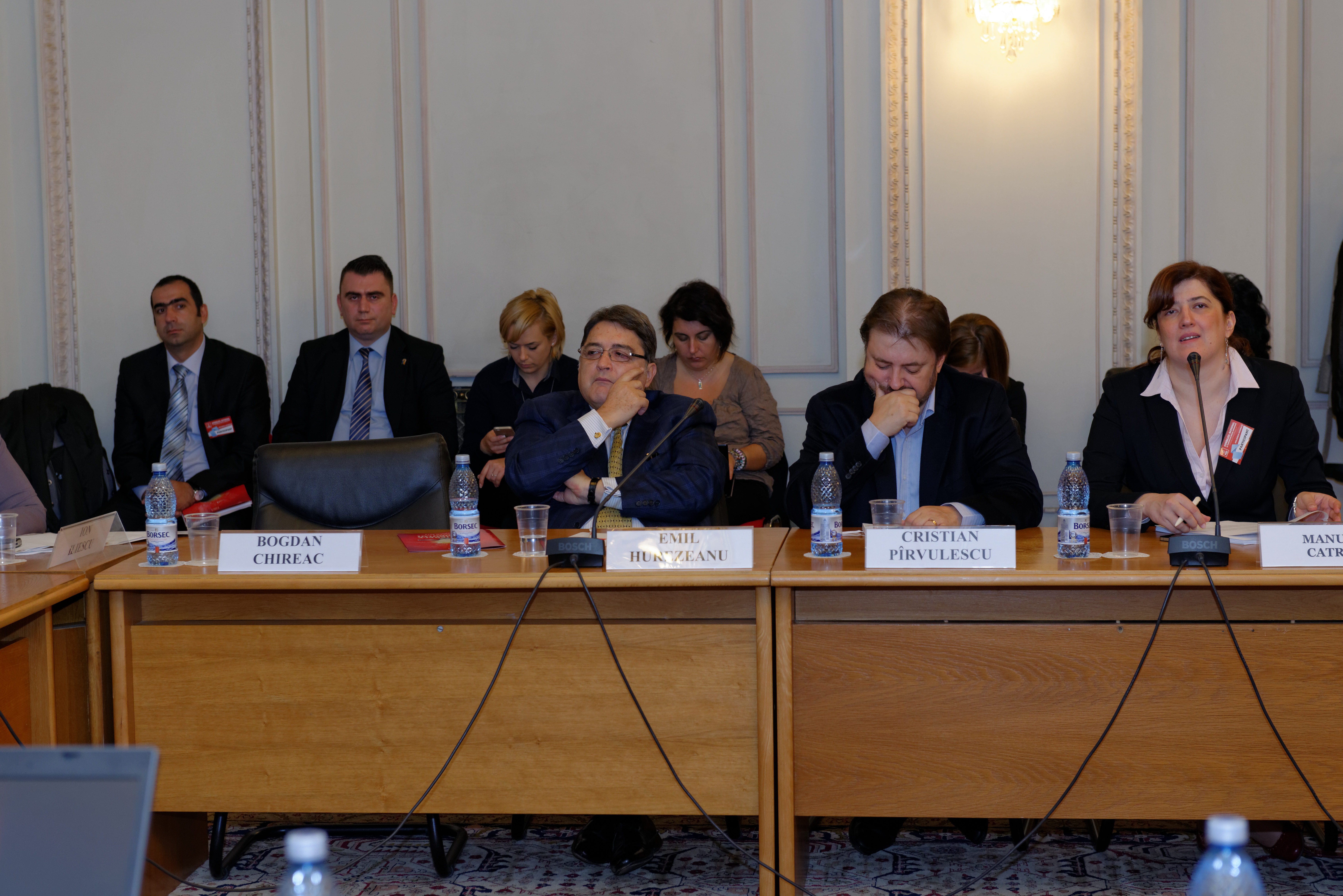 Atelierele Viitorului - Editia a III-a, Palatul Parlamentului